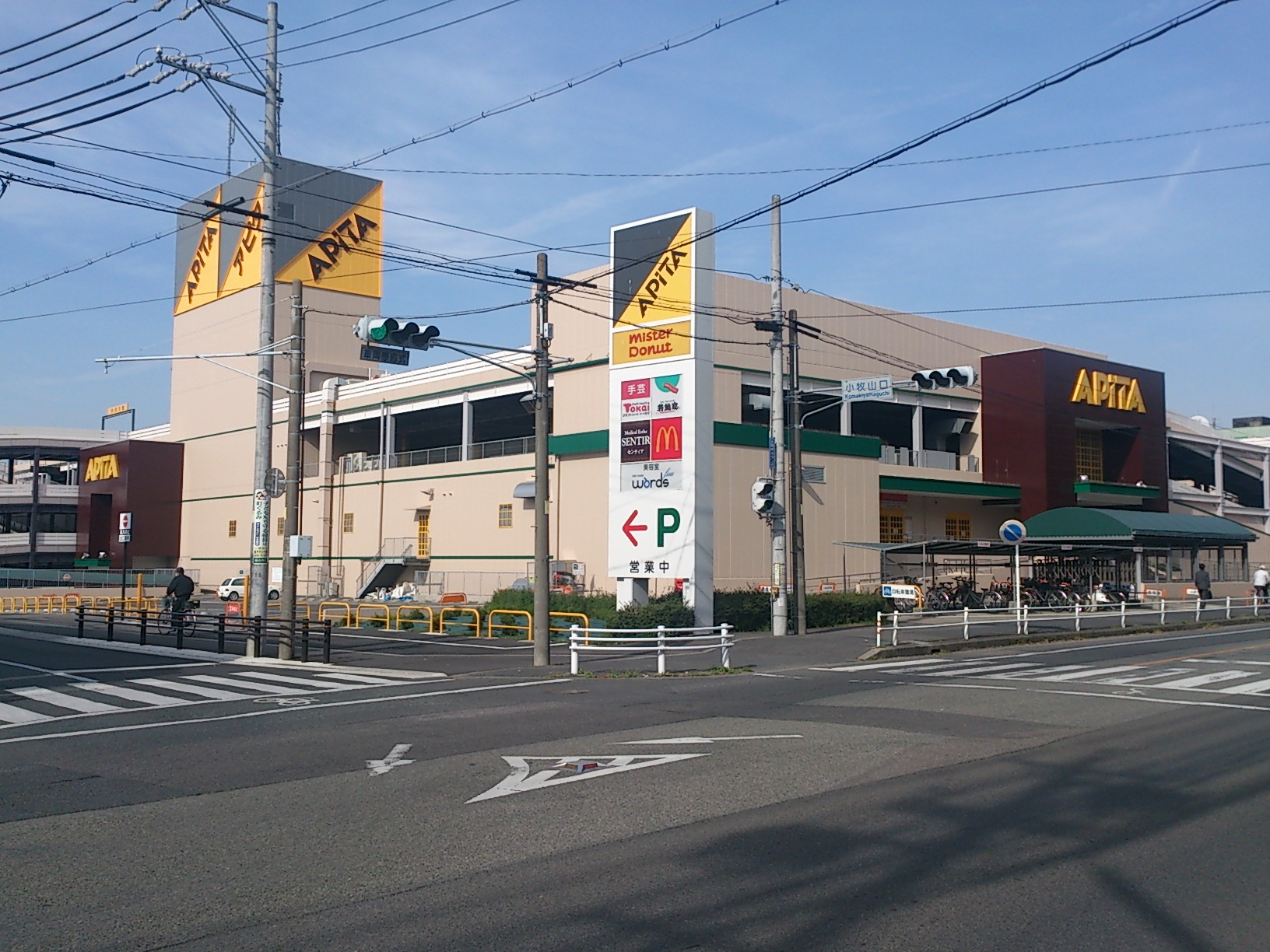 アピタ小牧店店舗外観